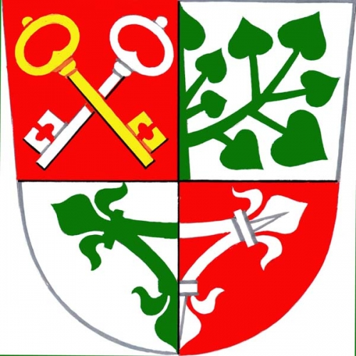 znak, Krásněves, okres Žďár nad Sázavou